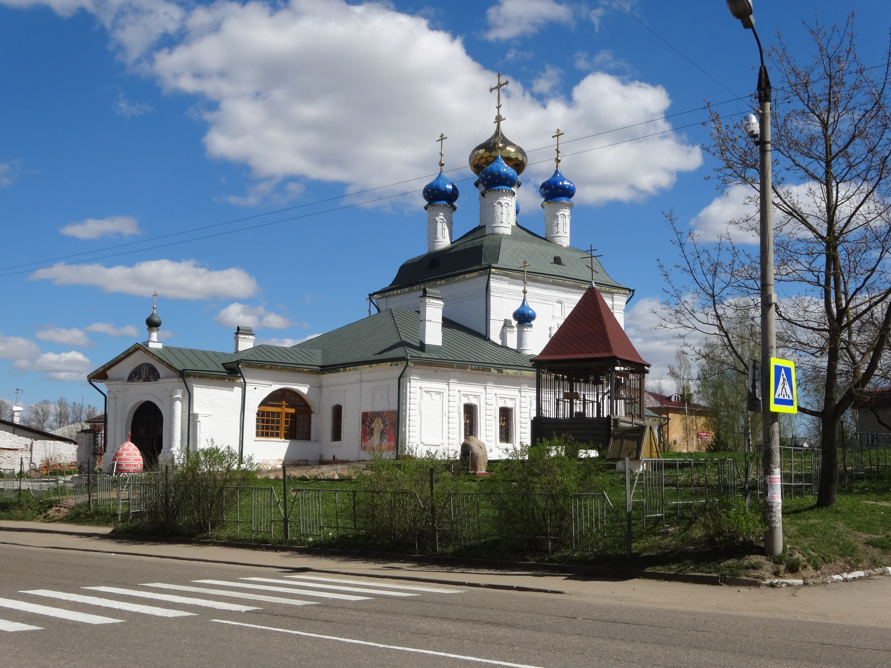 церковь Спаса Преображения в Вязьме